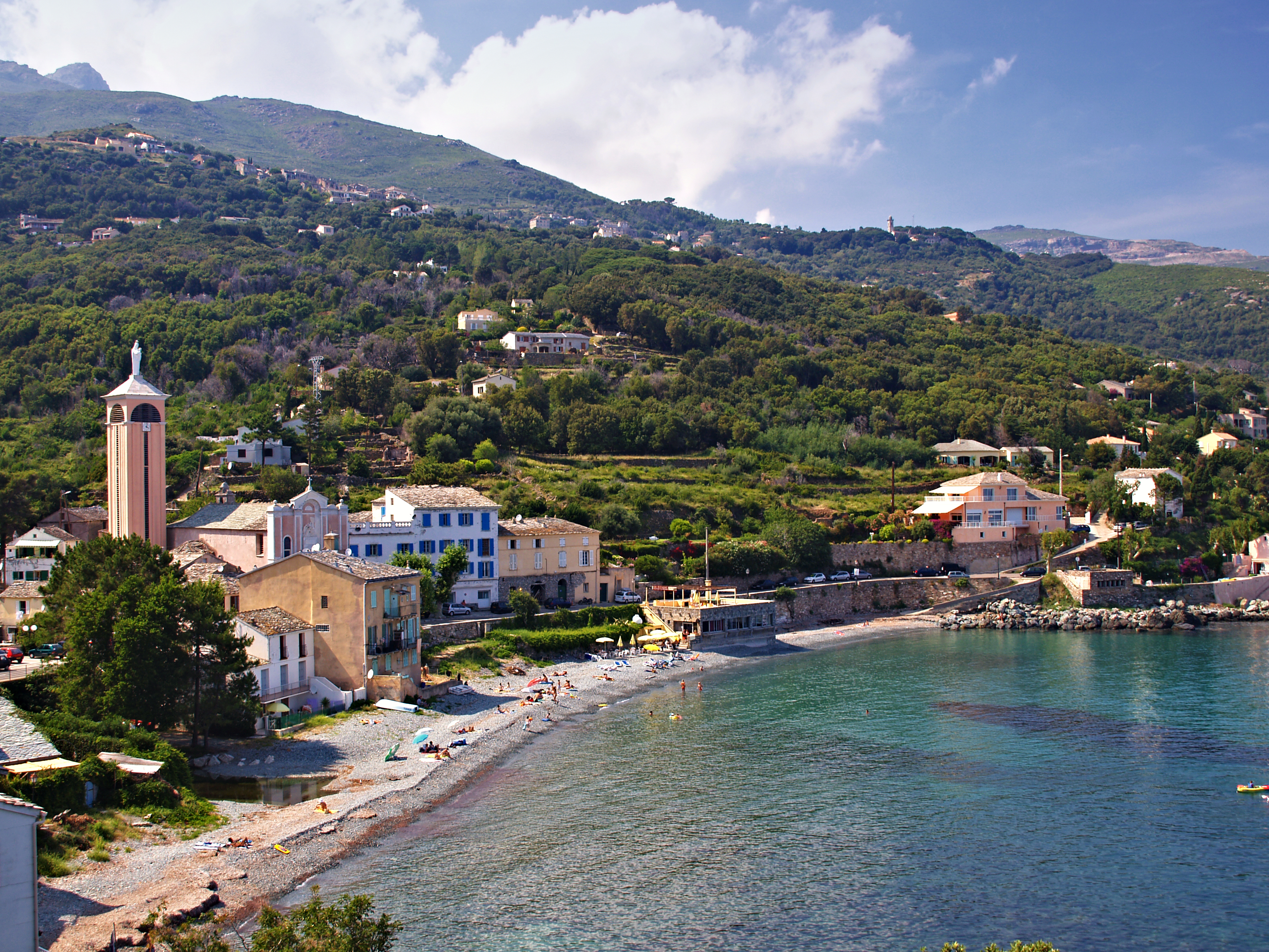 Brando - Hameau de Lavasina. Le ruisseau d'Arega (Fiume d'Arega) y a son embouchure au milieu de la plage de galets